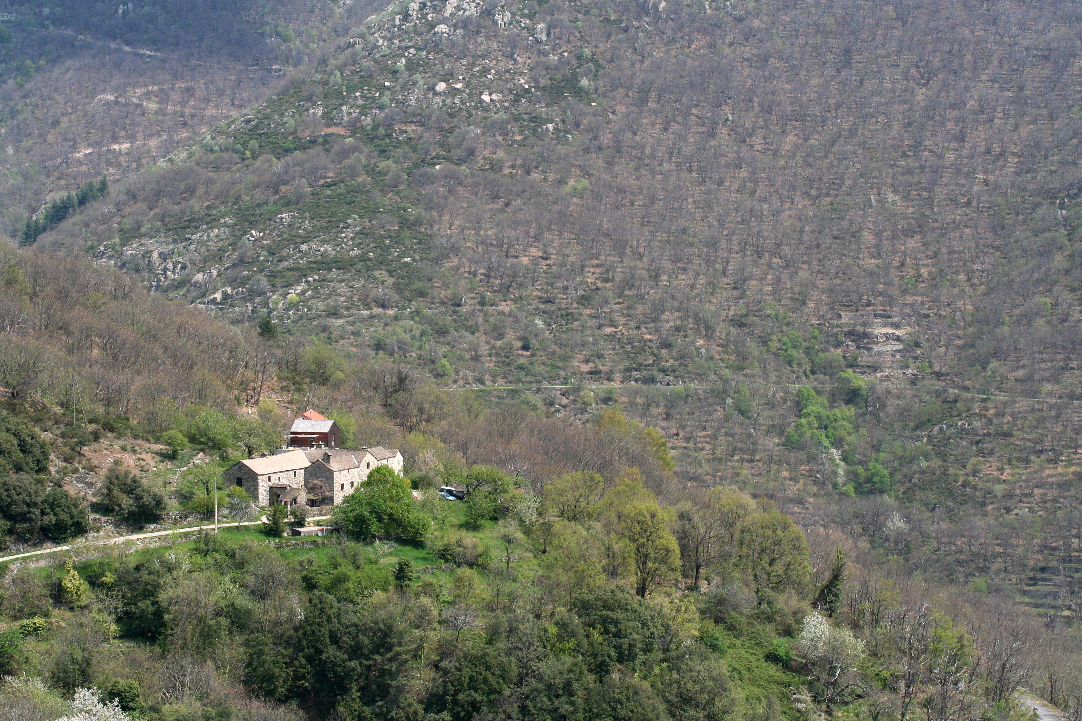 Guinebaldès - Pied-de-Borne - Lozère - France